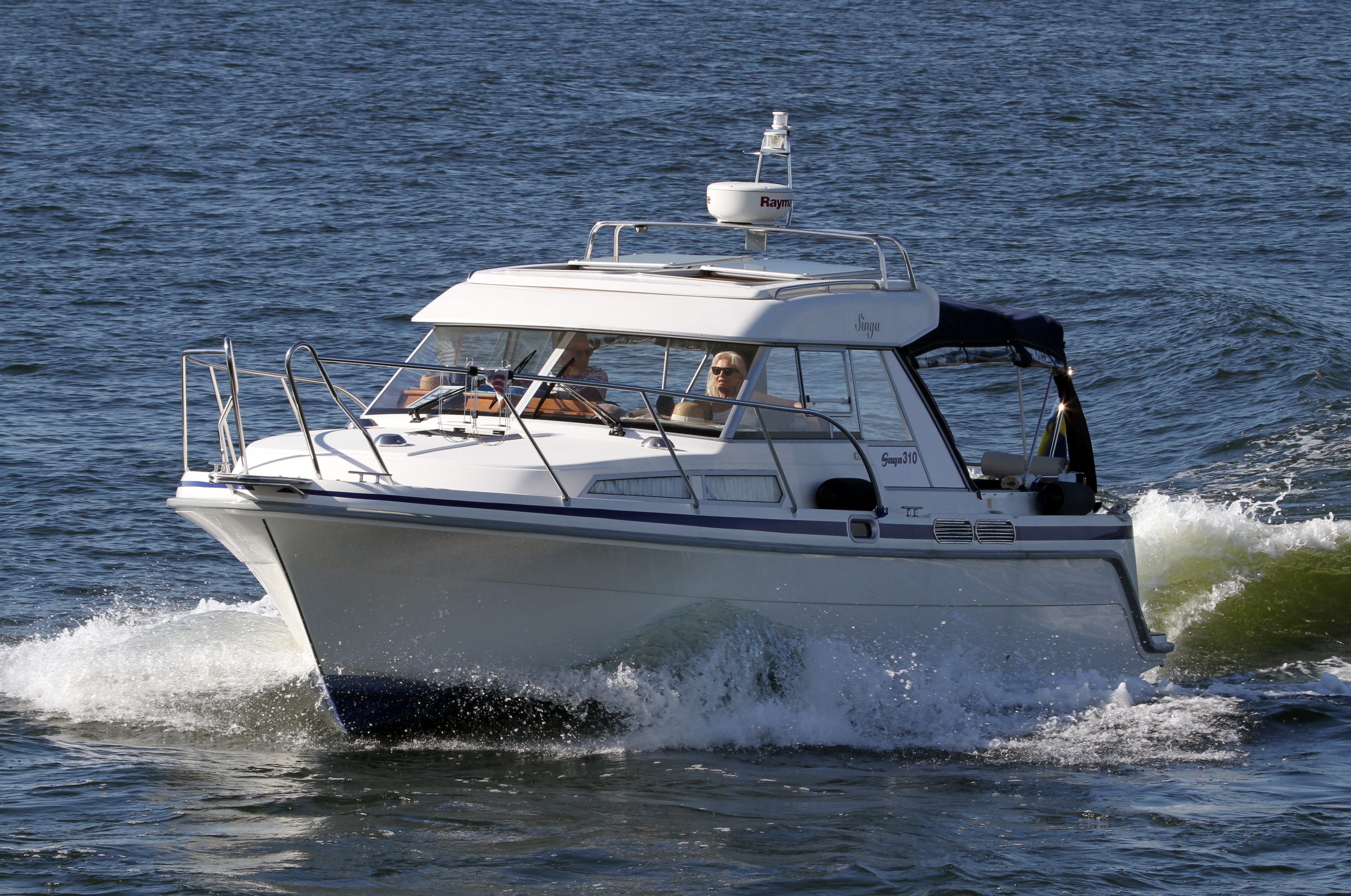 Saga 310 på Norra Vaxholmsfjärden, Vaxholm 4 augusti 2015